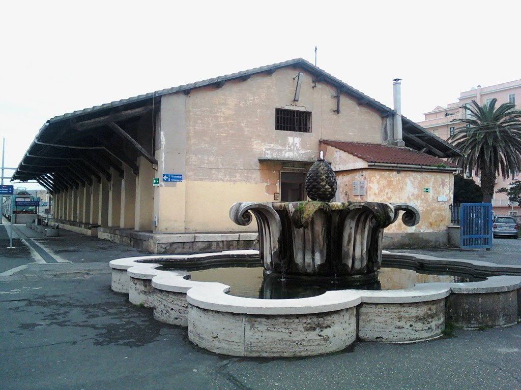 Magazzino merci della stazione di Civitavecchia